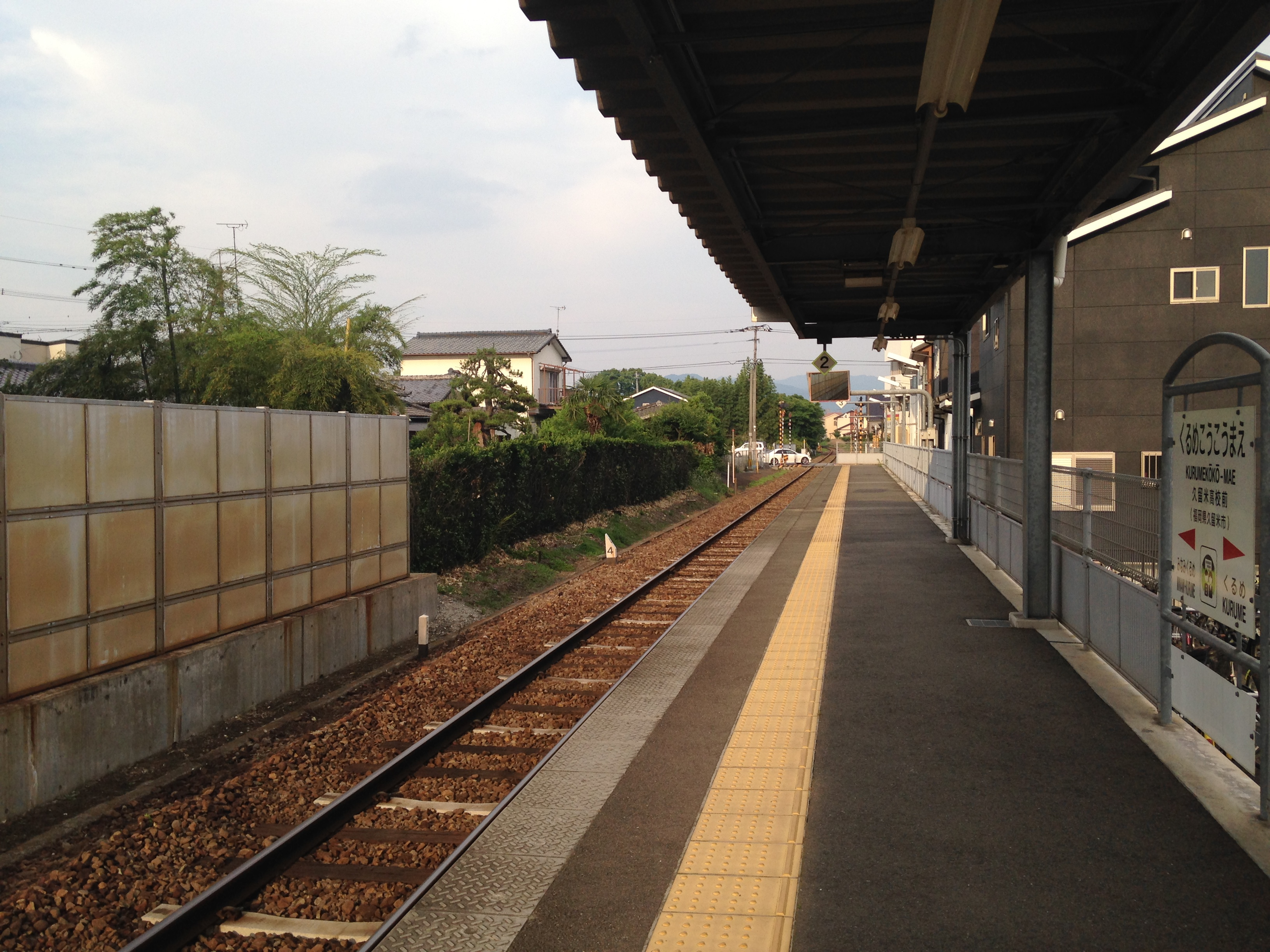 久留米高校前駅のホーム(南久留米方面)